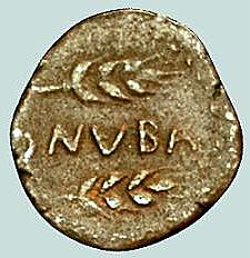 Moneda romana con la leyenda "Onuba" (Huelva)